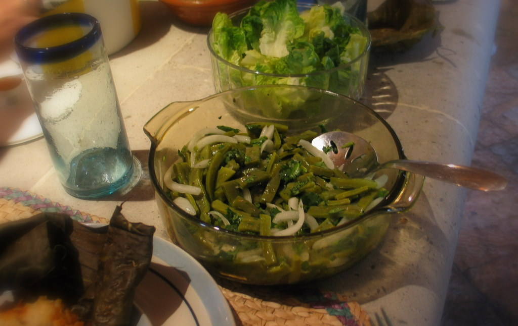 Ensalsada de nopales